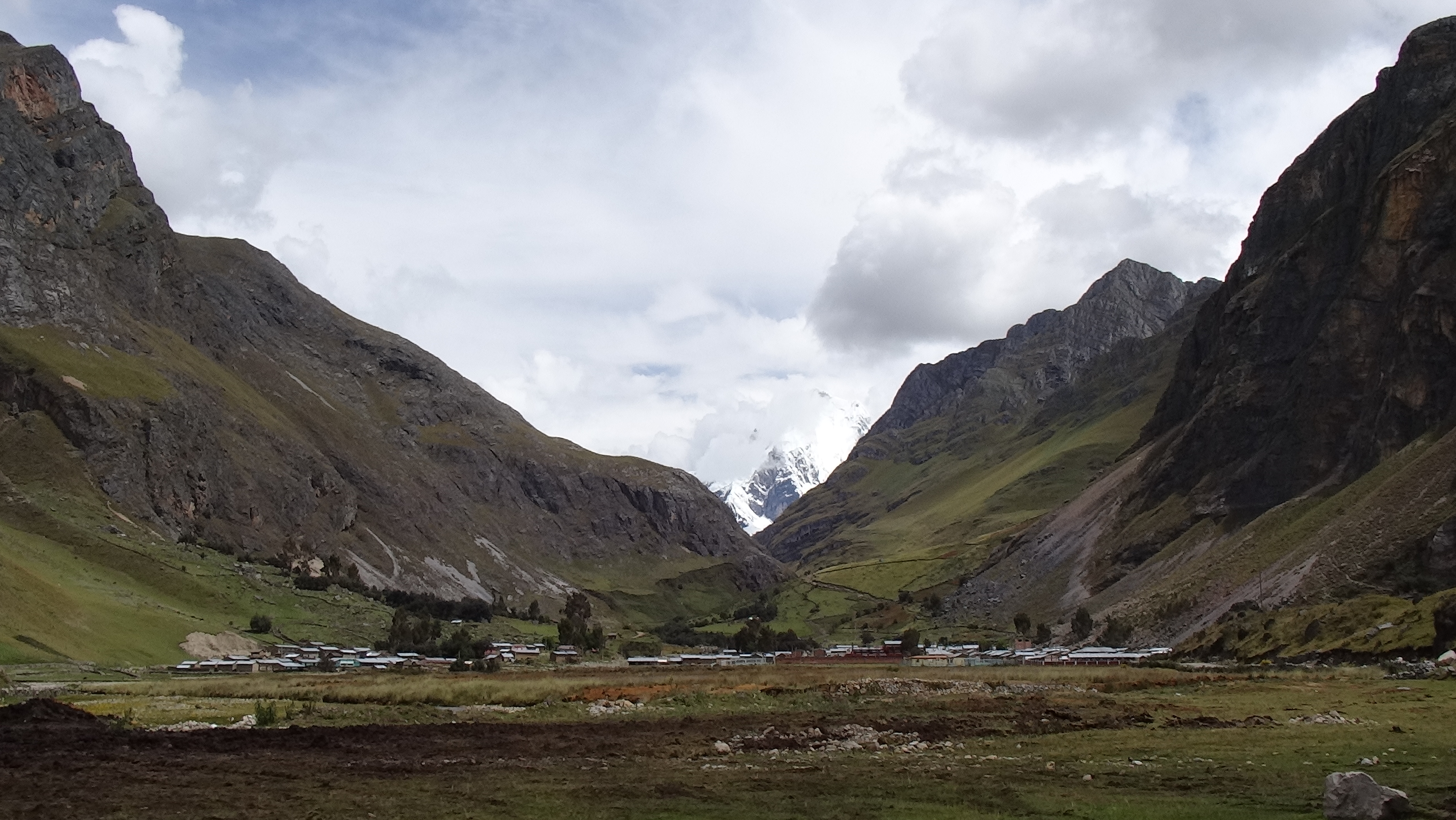 Parte norte del distrito de Queropalca donde se ve el plano de la ciudad homónima a su entrada.